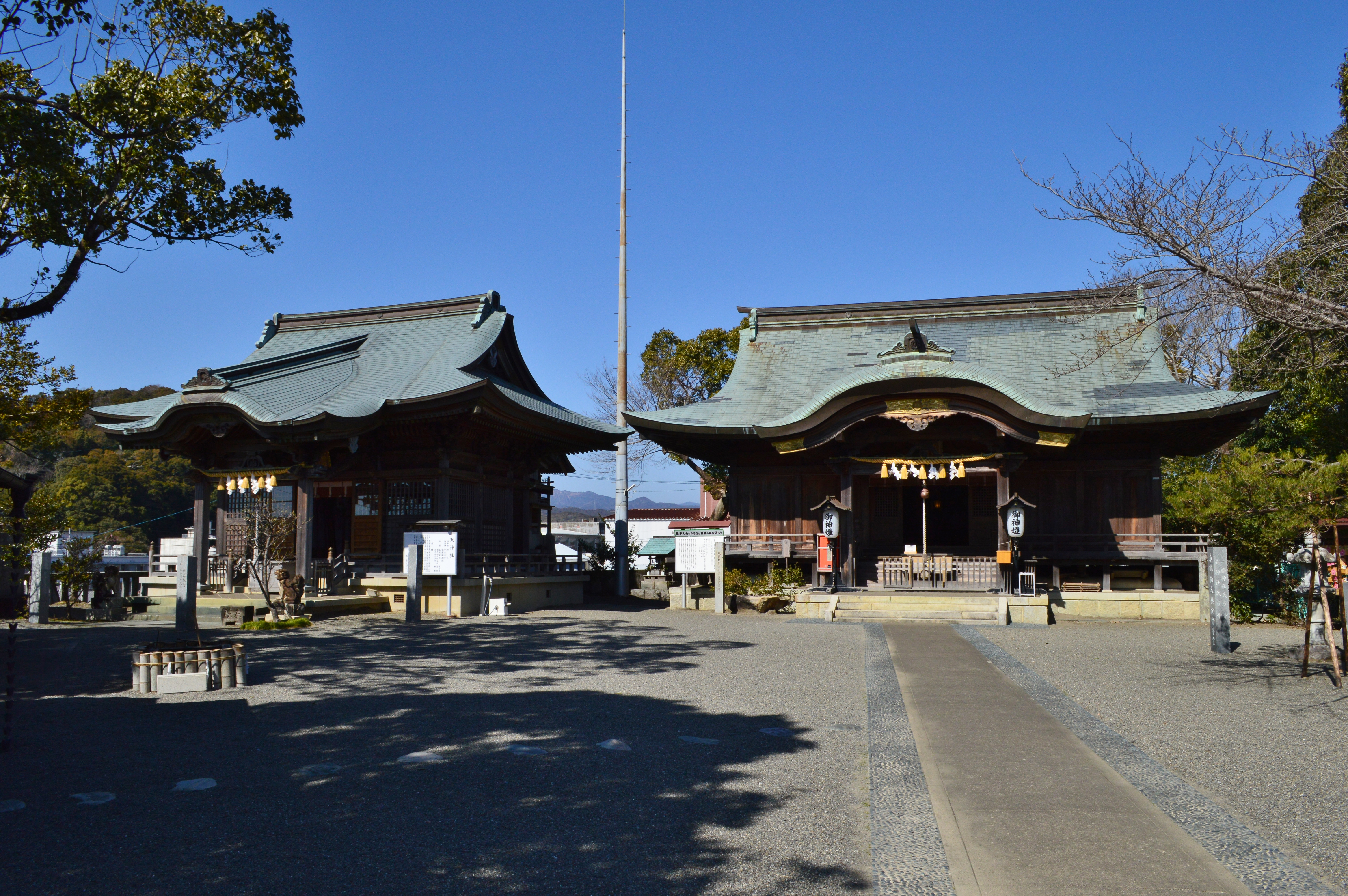 一條神社 本社拝殿と天神社